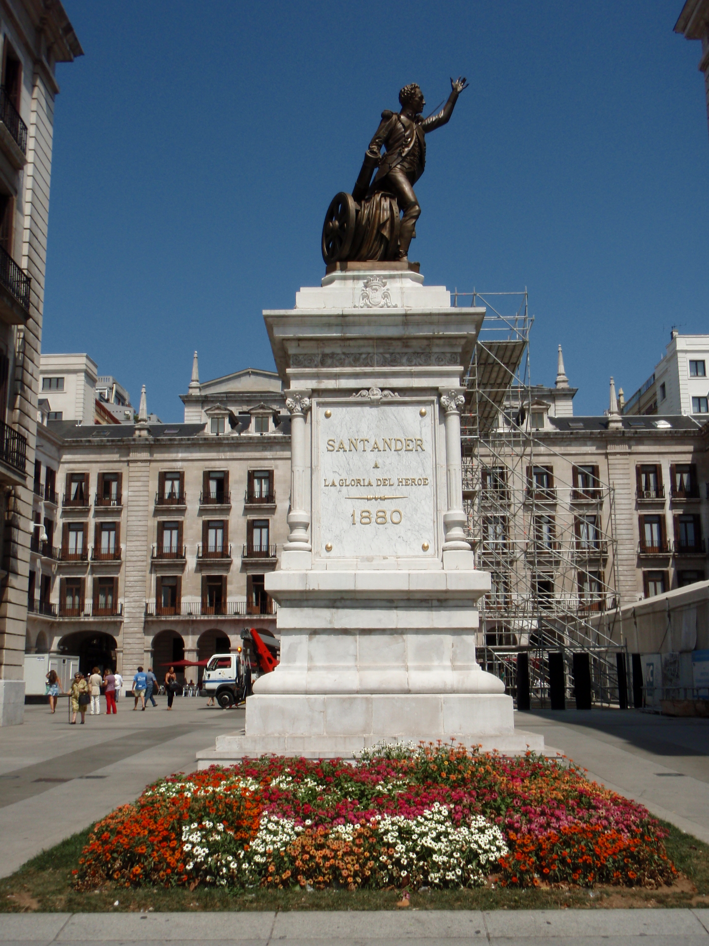 Estatua de Pedro Velarde en la Plaza Porticada de Santander. El texto dice: "Santander a la gloria del héroe. 1880".